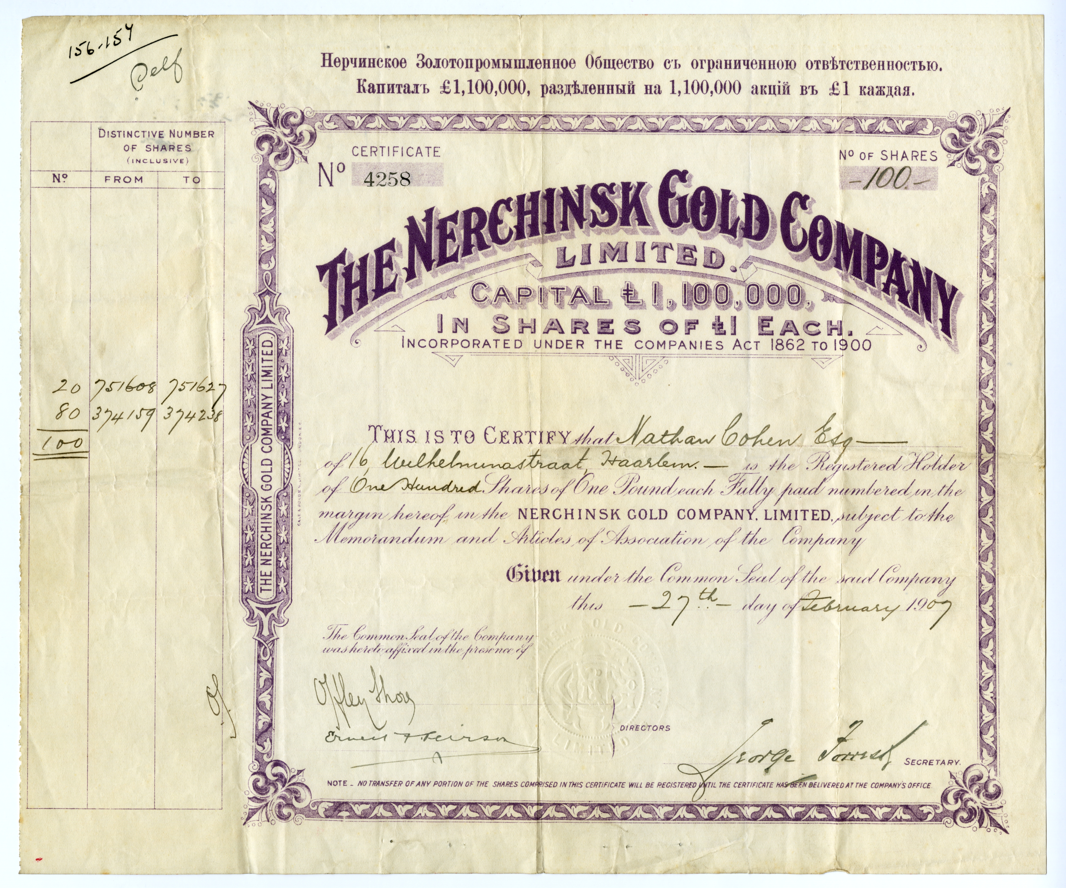 Именной сертификат на 100 акций номиналом в 1 ф.ст. каждая Английского акционерного общества под наименованием "Нерчинское золотопромышленное общество с ограниченной ответственностью"